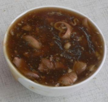 炒肝